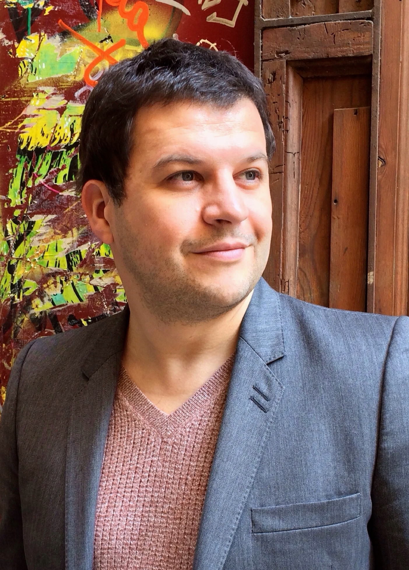 Guillaume Musso en mars 2014